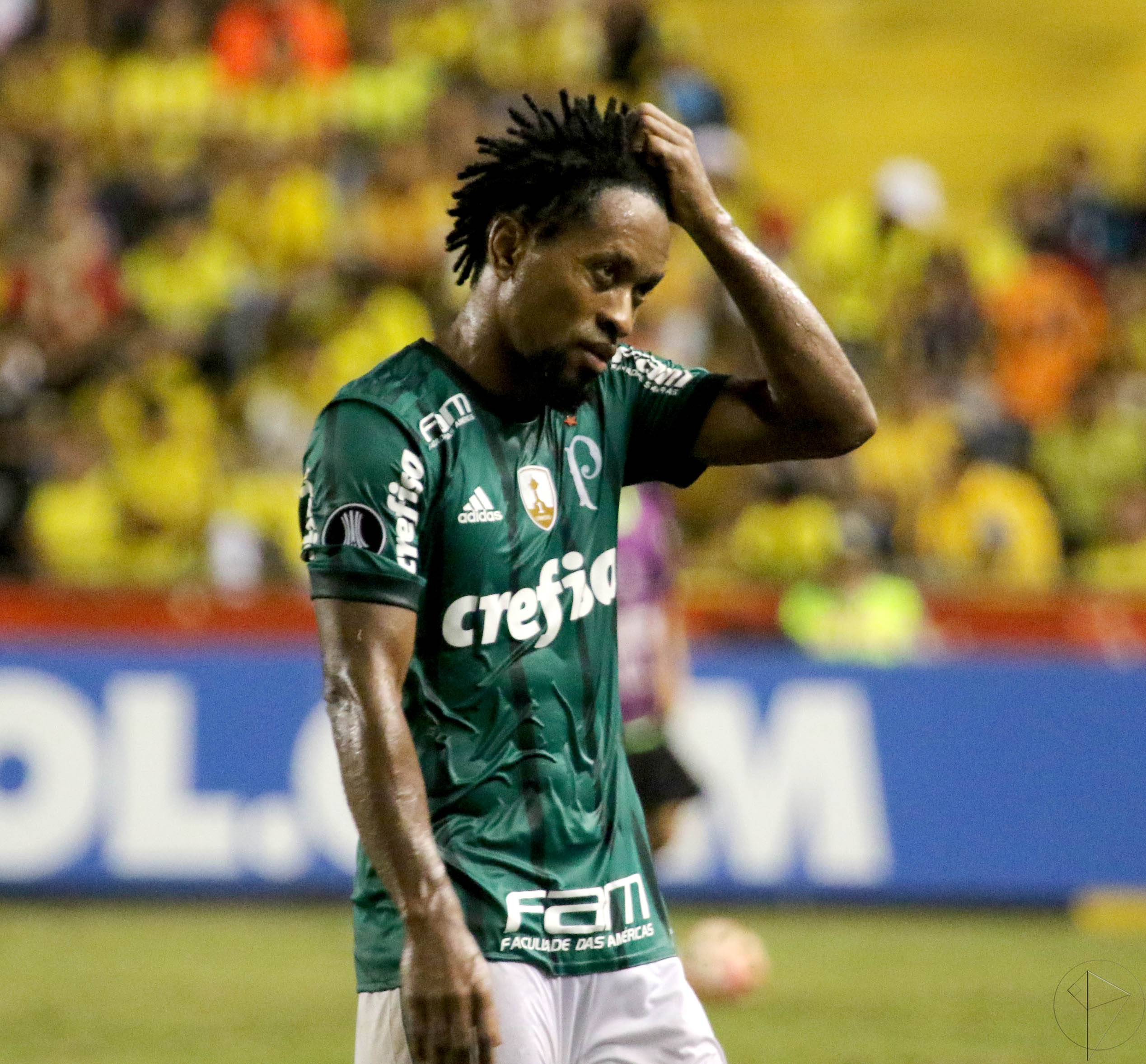 Guayaquil, miércoles 05 de julio del 2017 (Andes).-En el estadio Monumental, Barcelona enfrenta a Palmeiras por los octavos de final de la Copa Libertadores. En la gráfica Zé Roberto jugador delPalmeiras Foto:Andes/César Muñoz